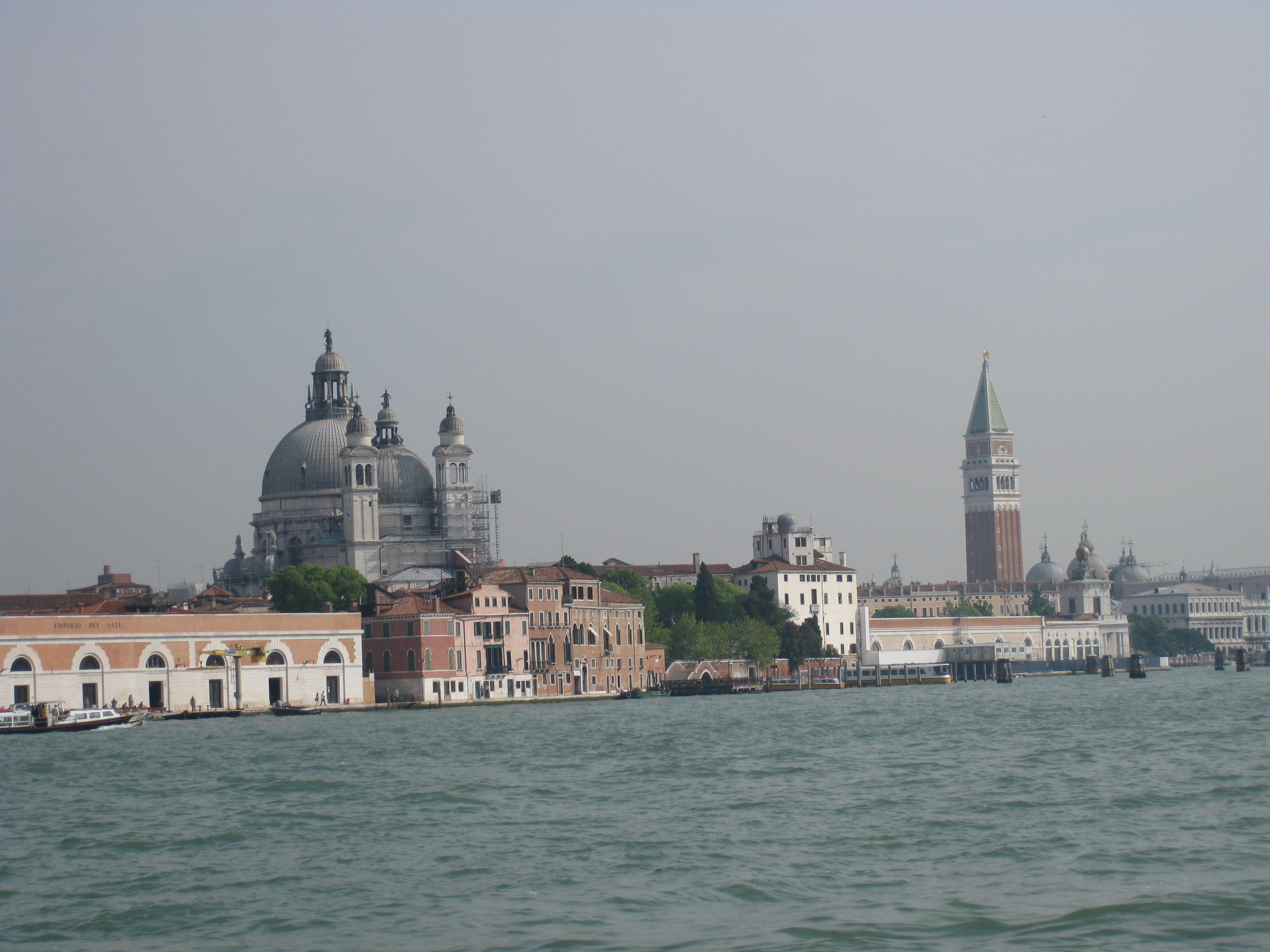 San Marko at sunset סן מרקו לעת השקיעה: ארמון הדוג'ים והקמפנילייה (מגדל השעון) של סן מרקו